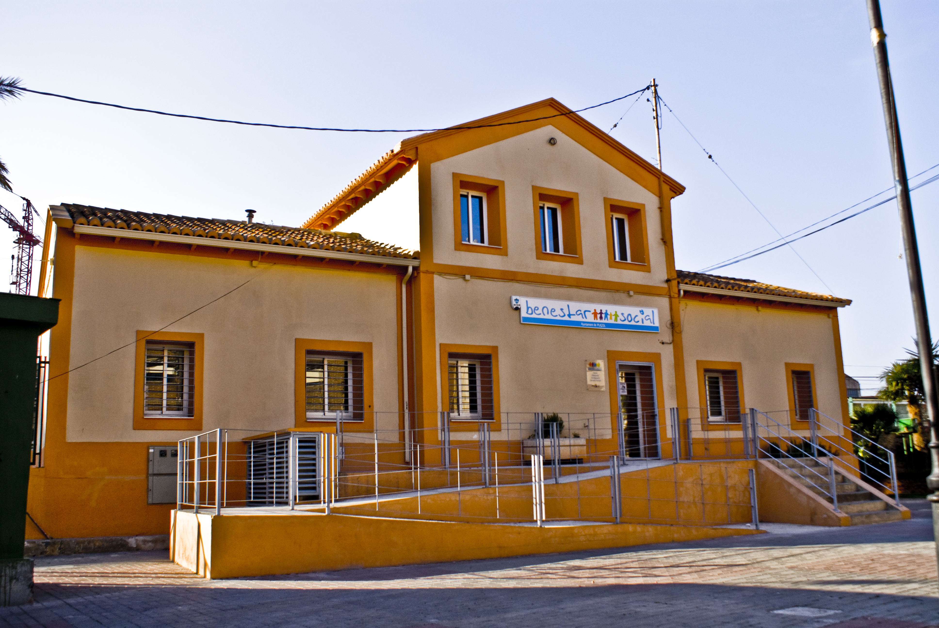 Vista de la façana principal de l'antiga estació de RENFE a Puçol.